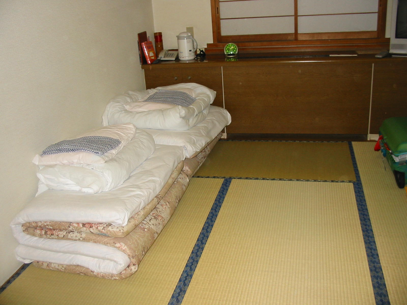 Kamer in een Ryokan in Tokyo, eigen foto van Gebruiker:Ellywa, ter beschikking gesteld onder GFDL